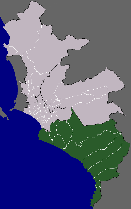 Mapa del Cono Sur de Lima